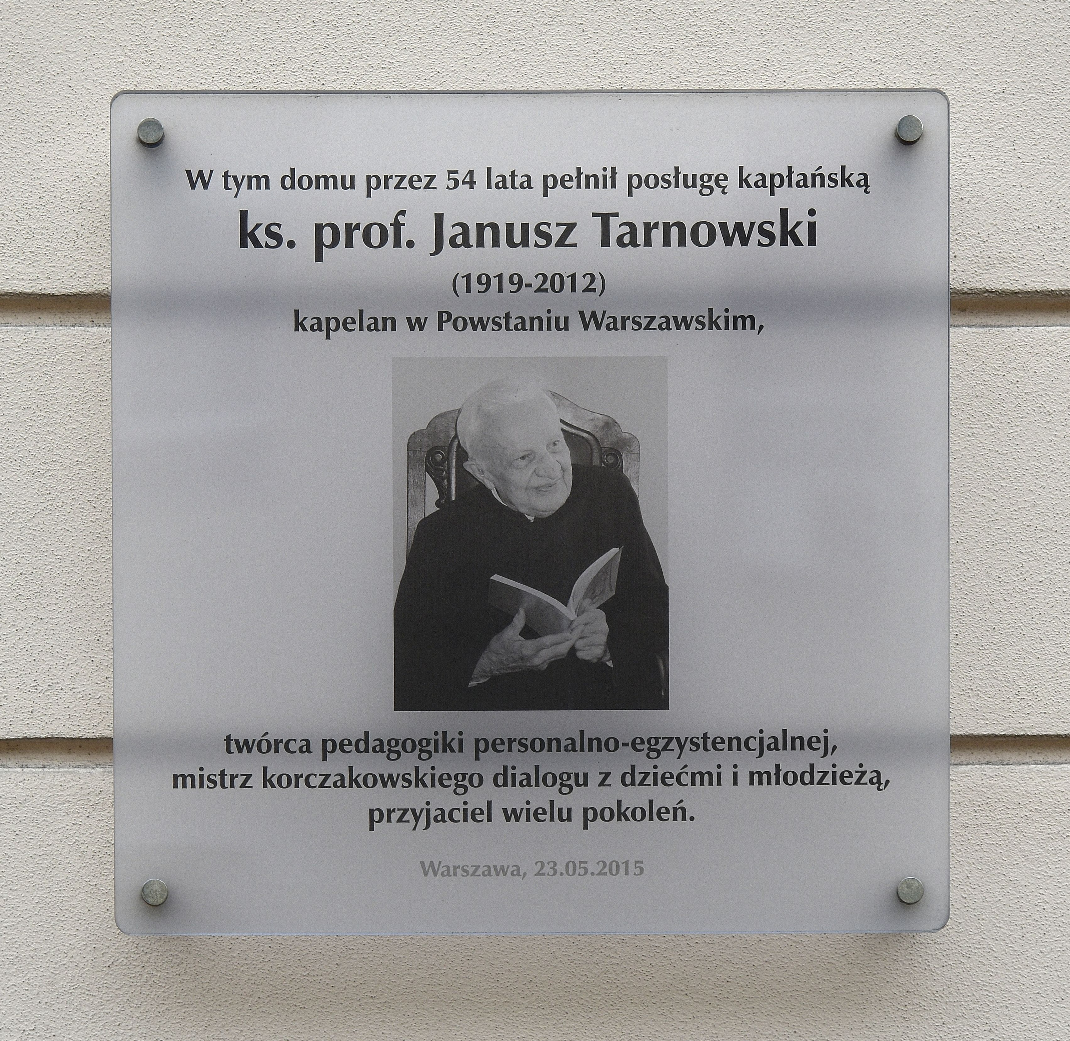 Tablica upamiętniająca Janusza Tarnowskiego na fasadzie pałacu Bogusławskiego w Warszawie